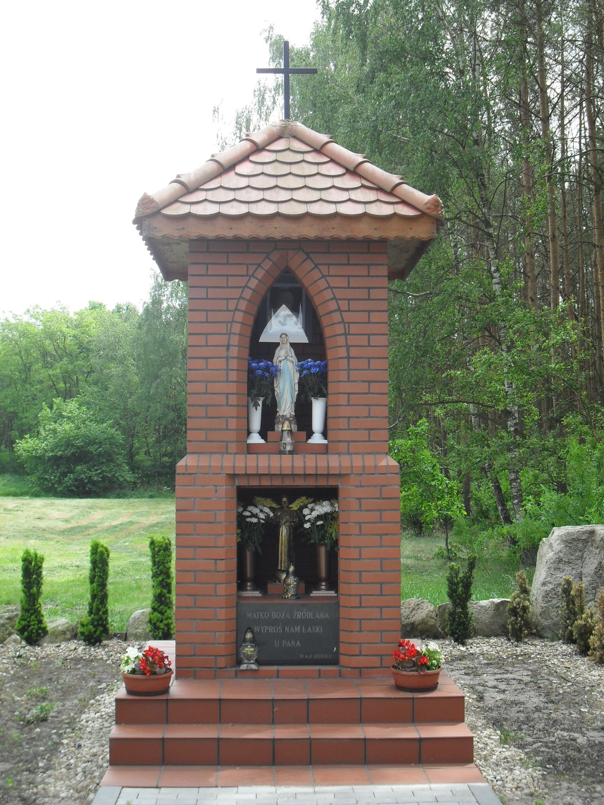 Przydrożna kapliczka Matki Bożej Źródlanej w Cielu.